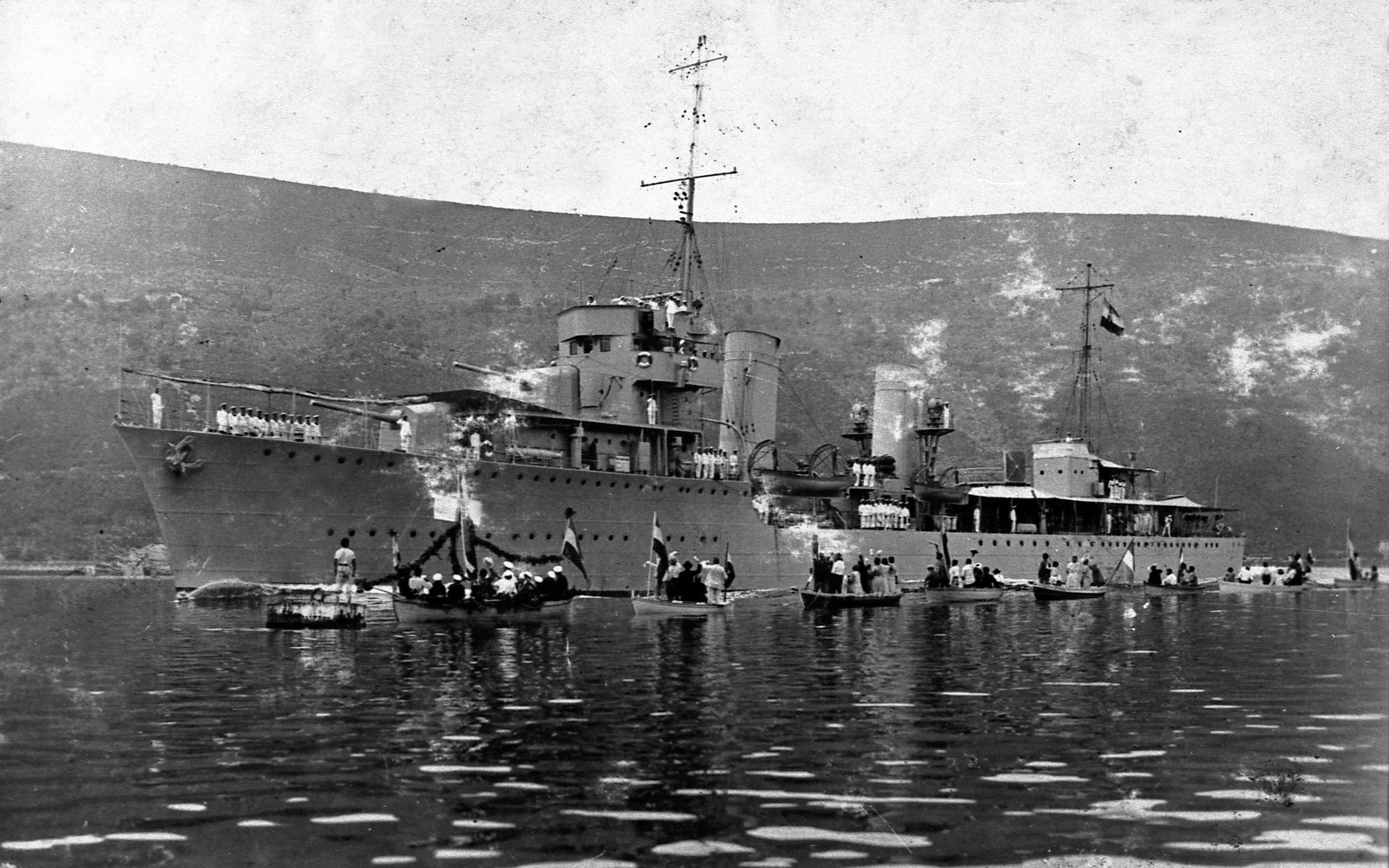 Народ дочекује разарач Дубровник у Боки Которској Description The people welcome the destroyer Dubrovnik in the Bay of KotorDate 14 July 1932Source Russian magazine "Морская Кампания 2017 №1 (65) Югославские эсминцы второй мировой"Author Unknown/Royal Yugoslav Navy The people welcome the destroyer Dubrovnik in the Bay of Kotor